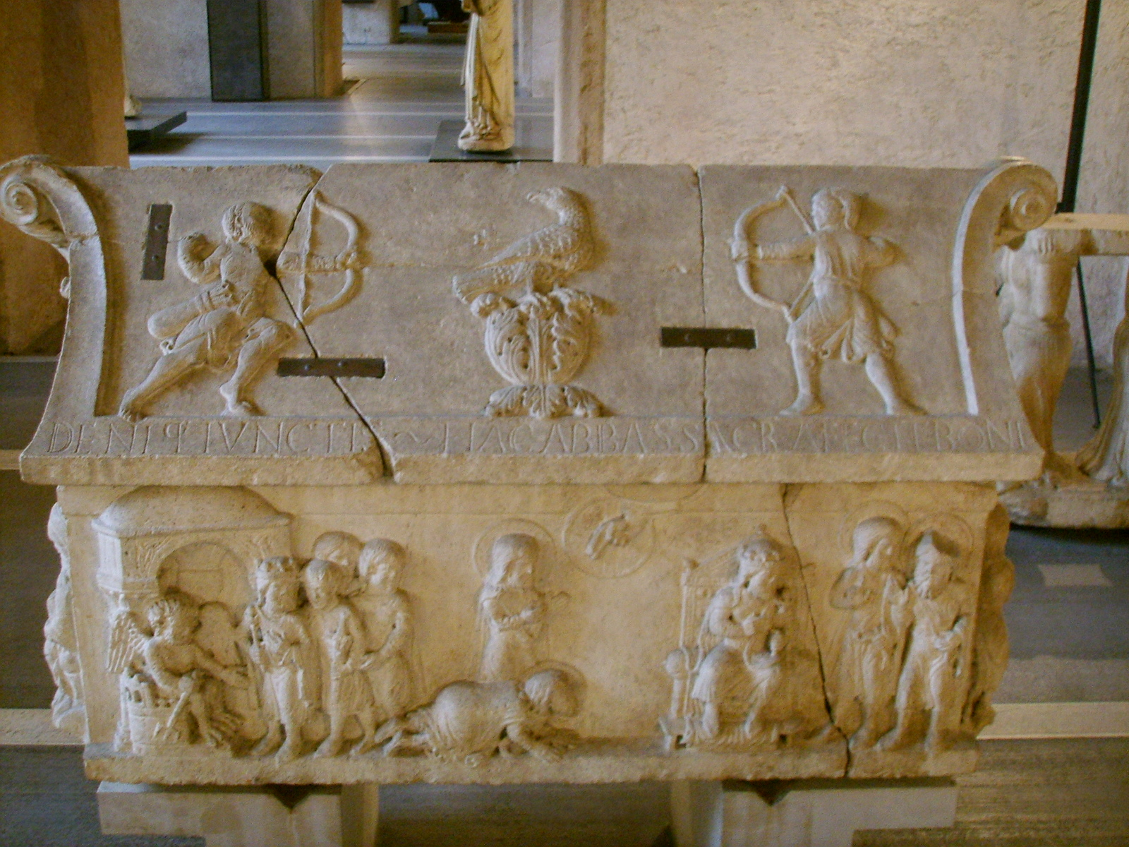 Museo di Castelvecchio a Verona, Sarcofago dei santi Sergio e Bacco.